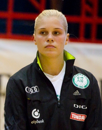 Ivett Kurucz